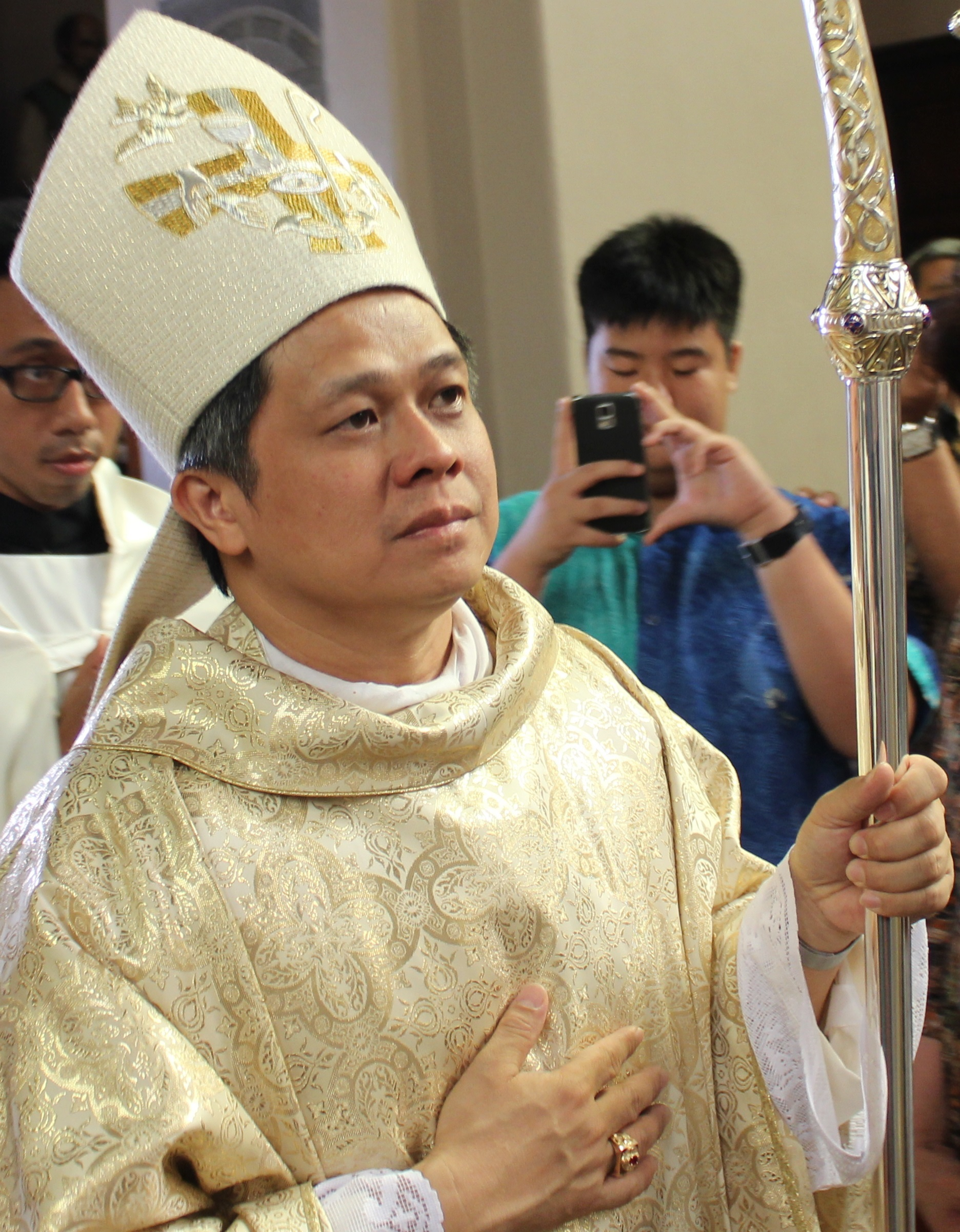 Mgr. Antonius Subianto Bunjamin, Uskup Keuskupan Bandung